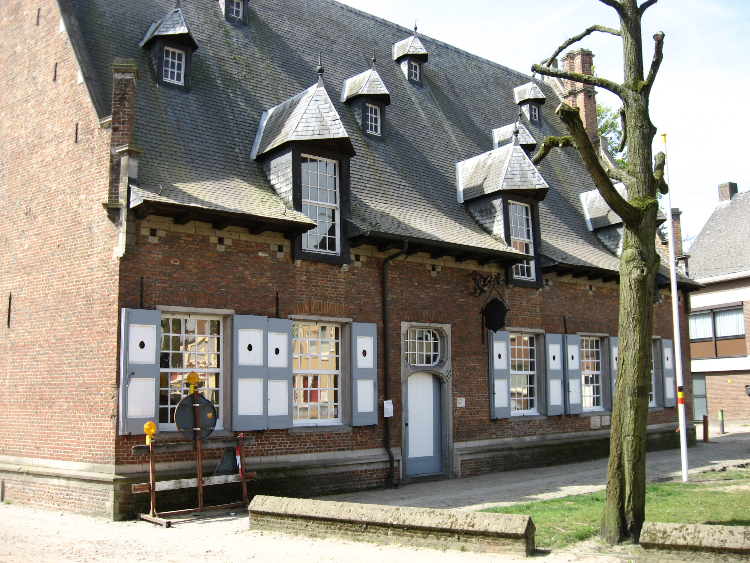 Schepenhuis in Brecht